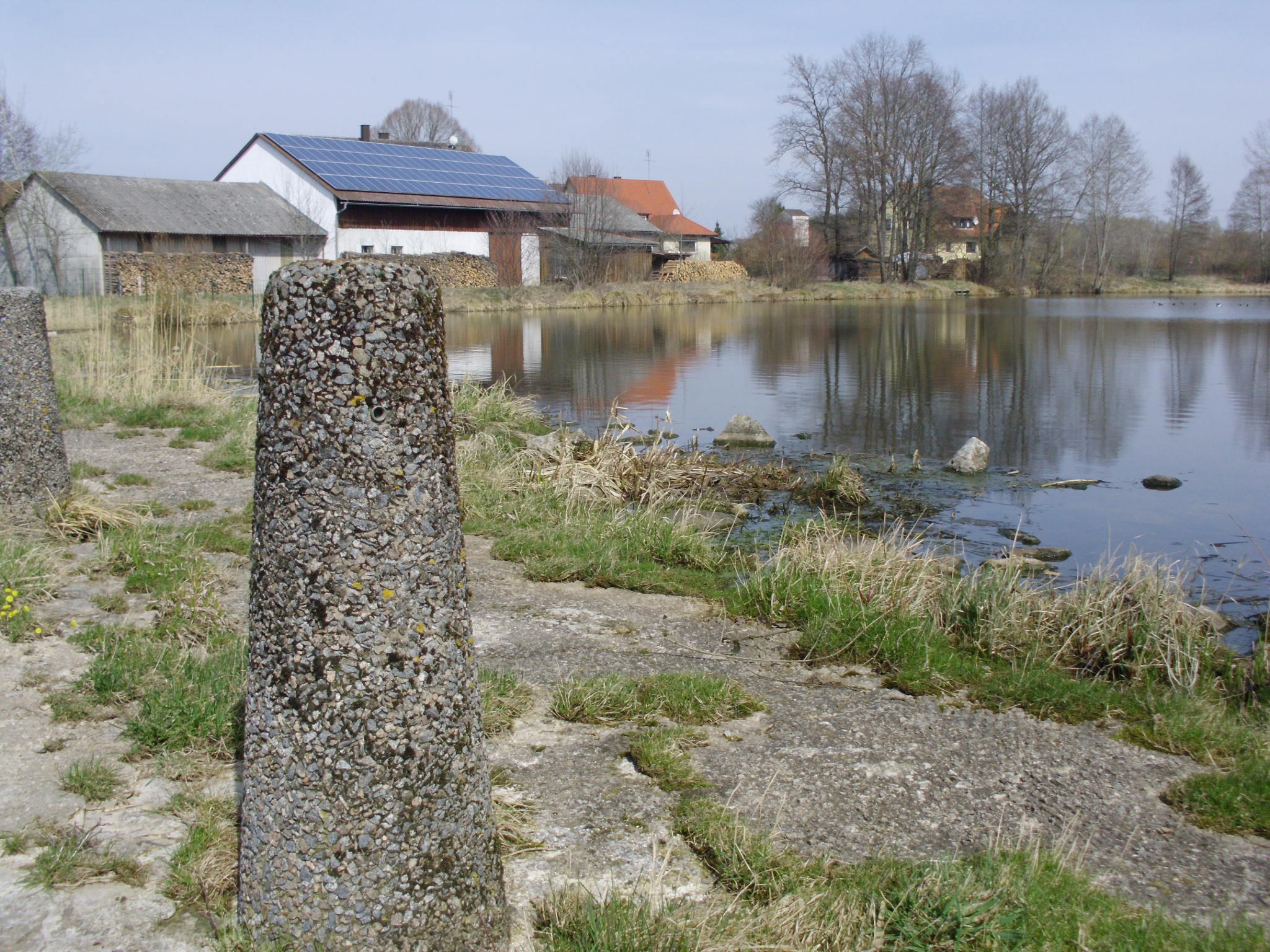 Hühnermühle am Altmühlüberleiter, Ortsteil von Pfofeld im mittelfränkischen Landkreis Weißenburg-Gunzenhausen